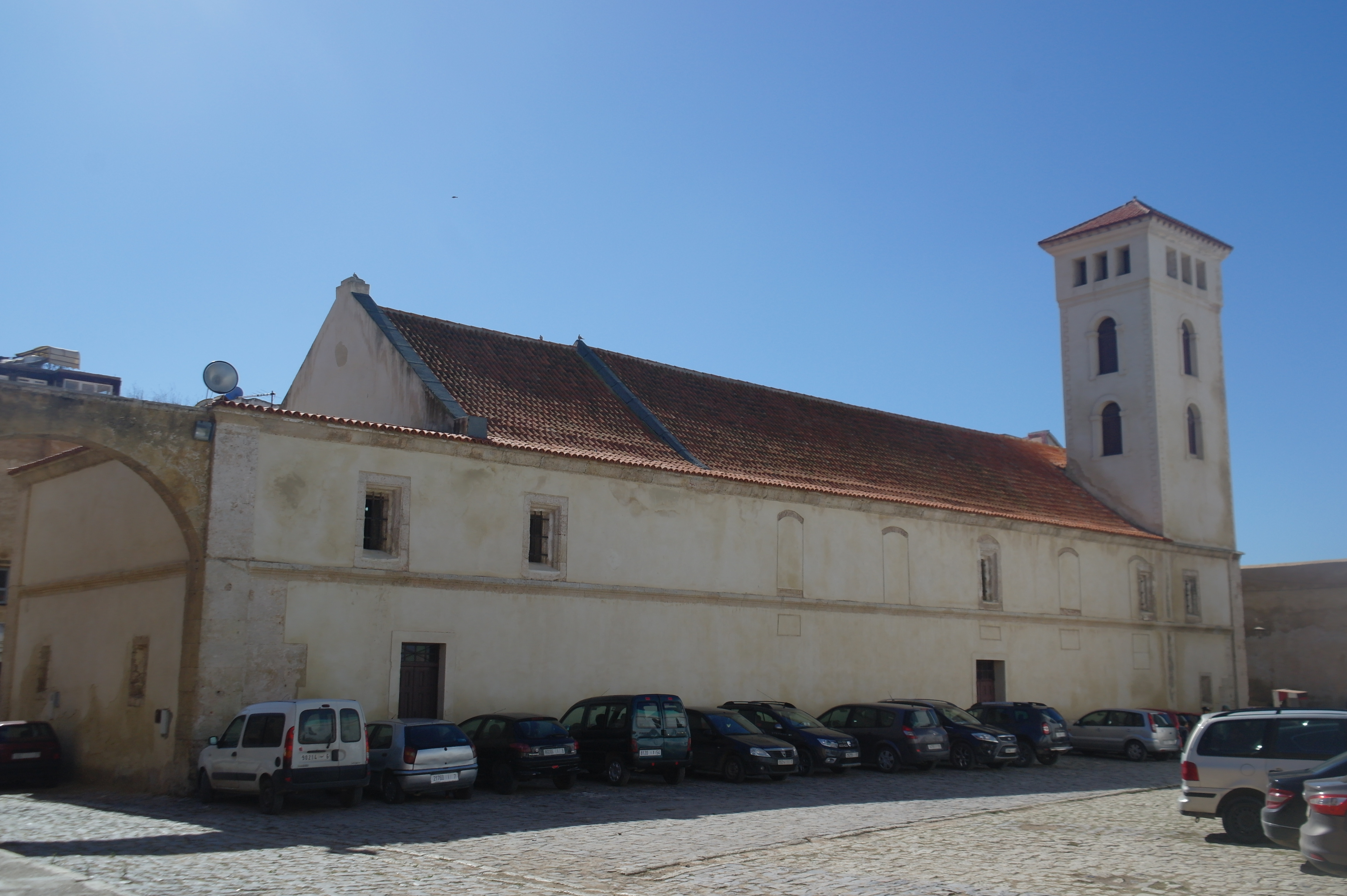 église Notre-Dame-de-l'Assomption